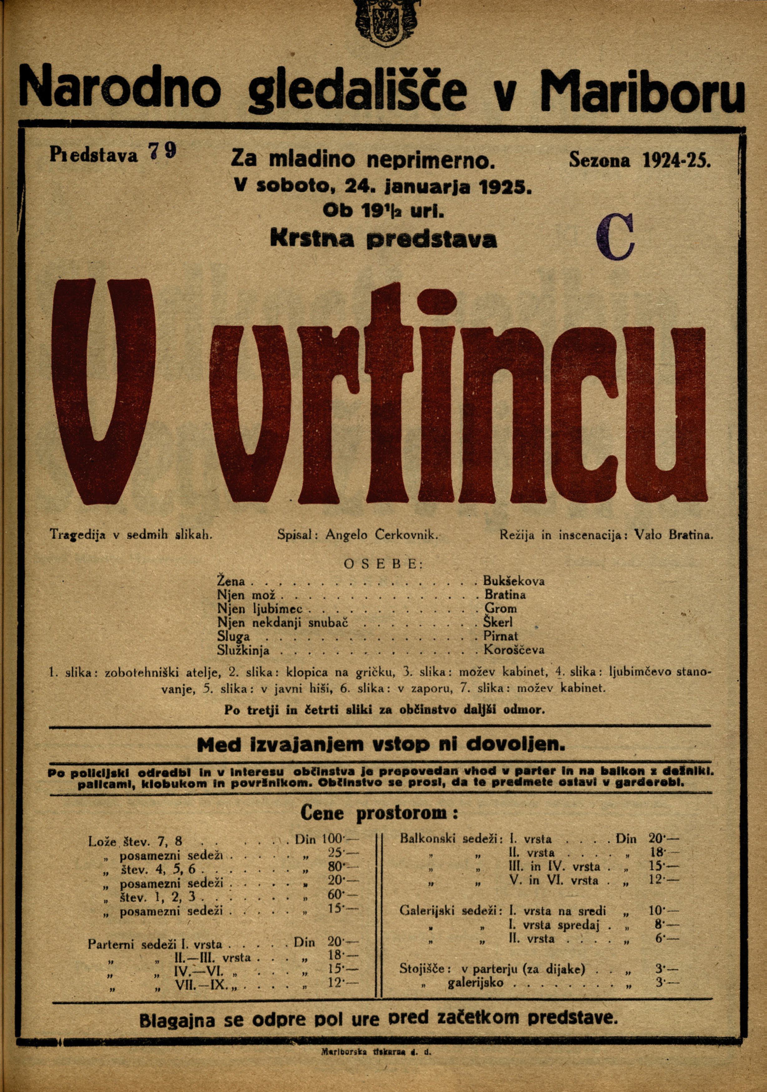 Plakat za predstavo V vrtincu v Narodnem gledališču v Mariboru.